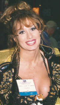 Jordan Lee